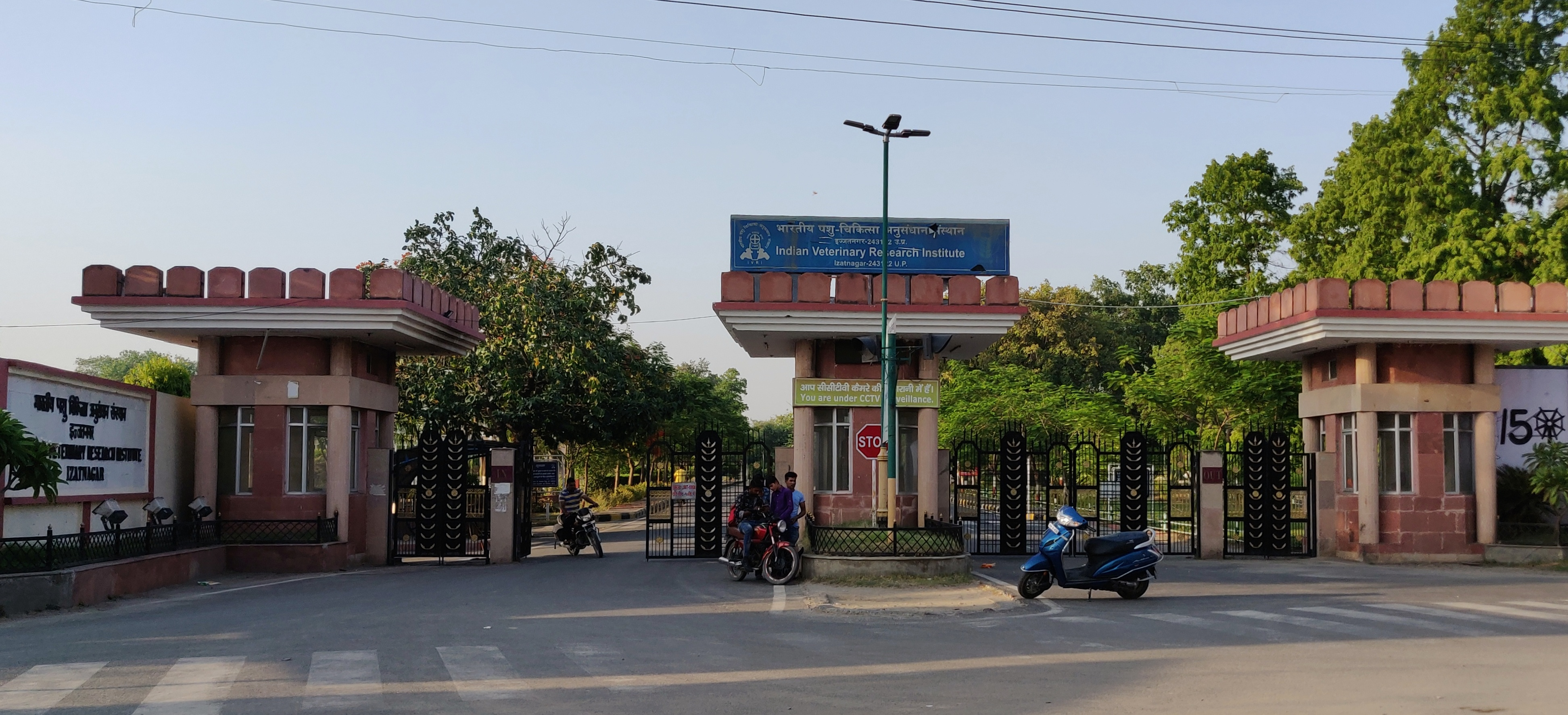 IVRI Izatnagar, Bareilly